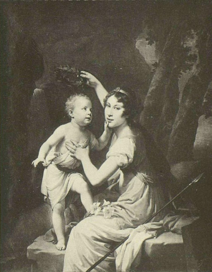 Екатерина Николаевна Любомирская, ур. графиня Толстая (1789—1870), была замужем за генерал-лейтенантом князем Константином Ксаверьевичем Любомирским (1786—1870), в браке имела одного сына и шесть дочерей. Изображена с братом Эммануилом Николаевичем Толстым (1802—1825). Первоначально портрет находился в коллекции Любомирской в Париже, сегодня его место нахождения неизвестно.